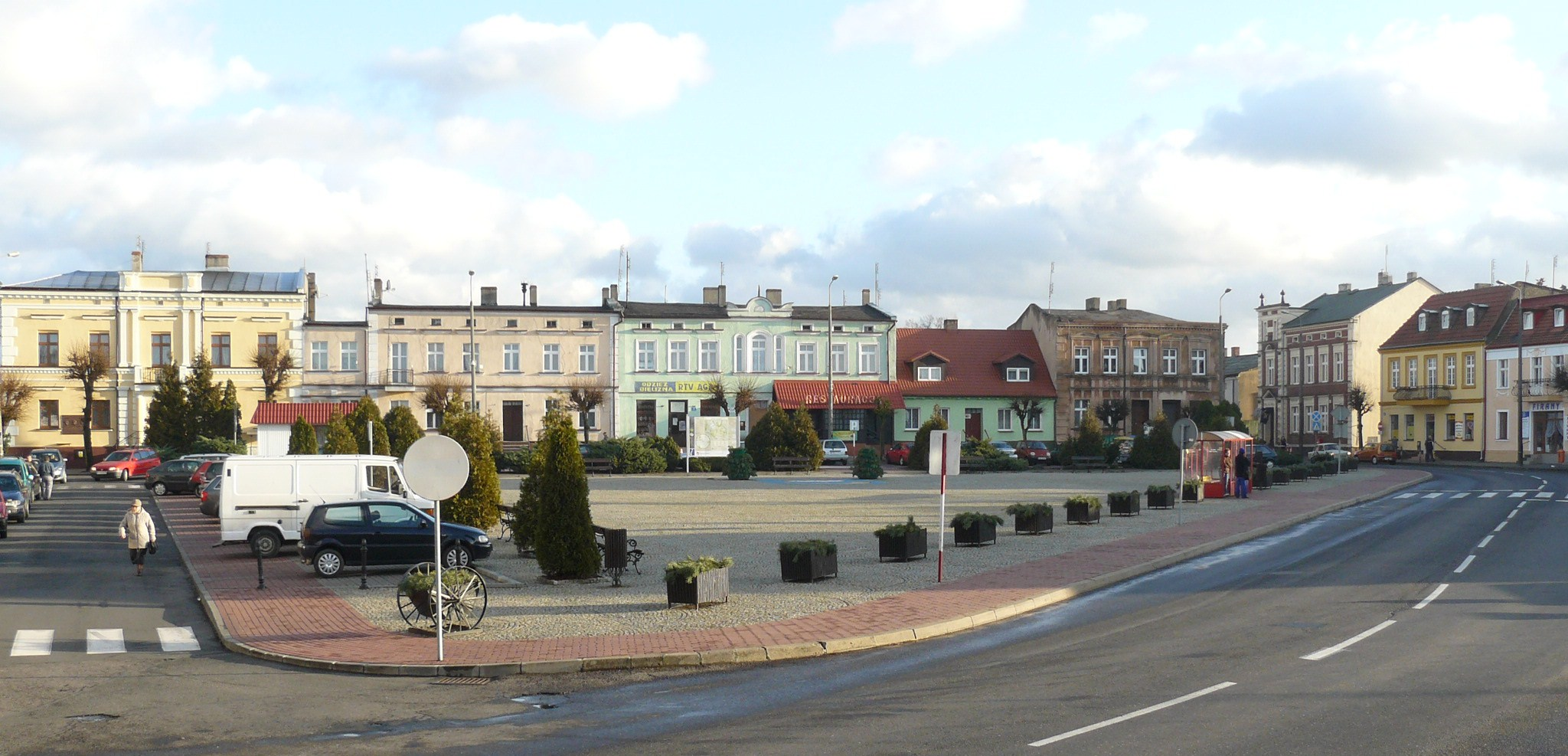 Kłecko - market square.